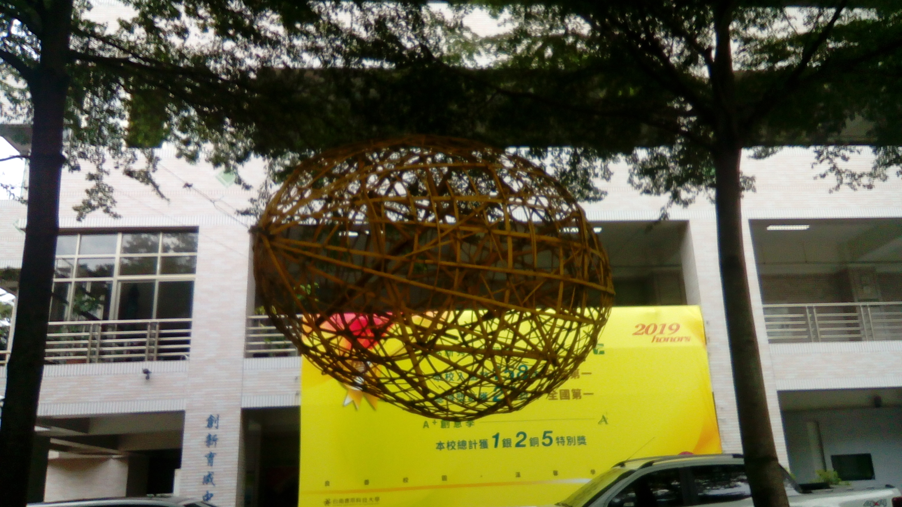 位於教學大樓和家政館之間